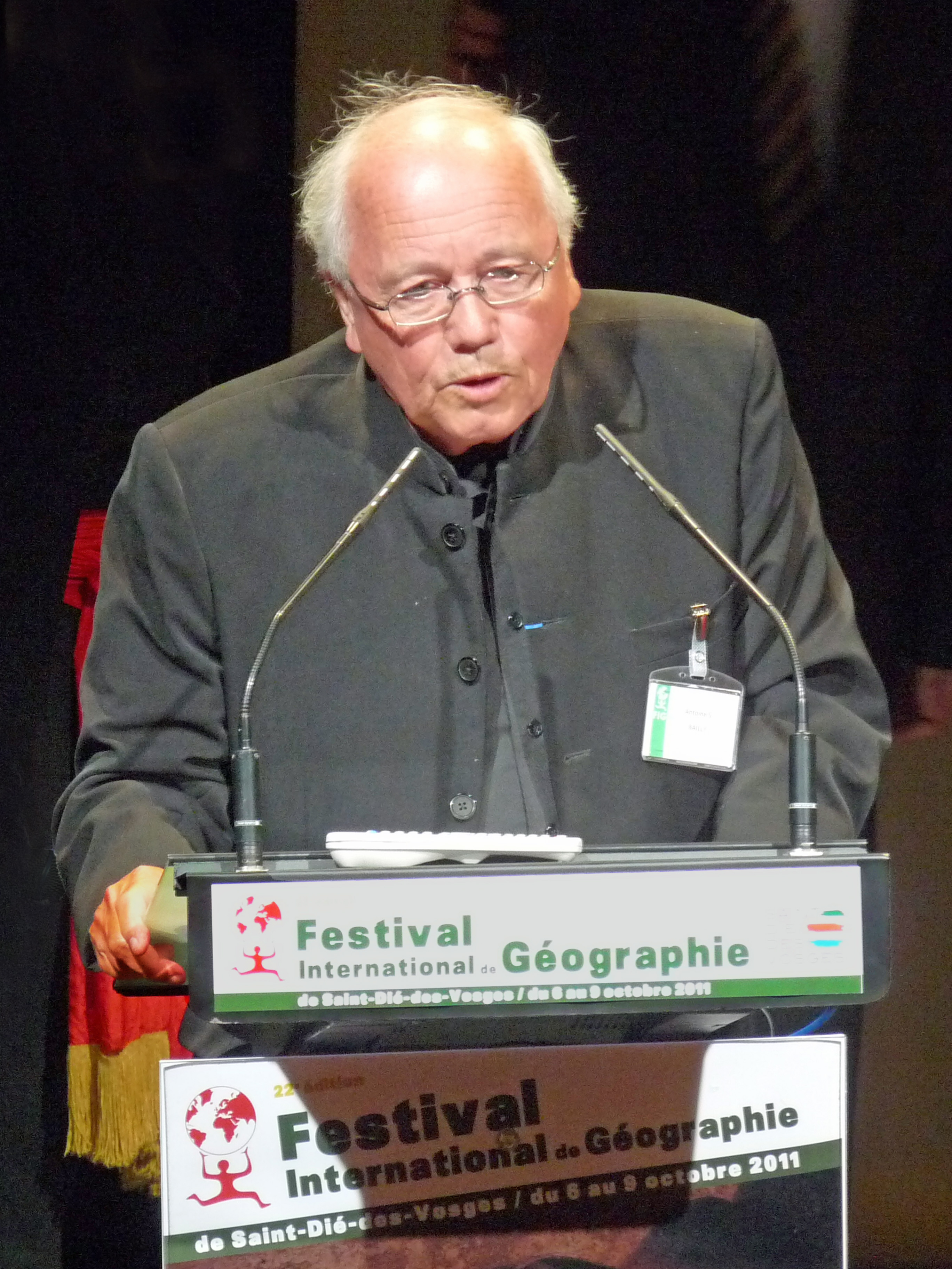 Antoine Bailly, lauréat du prix Vautrin Lud (Festival international de géographie de Saint-Dié-des-Vosges)